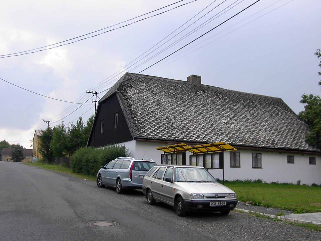 Hlavní­ silnice v Nemanicí­ch.